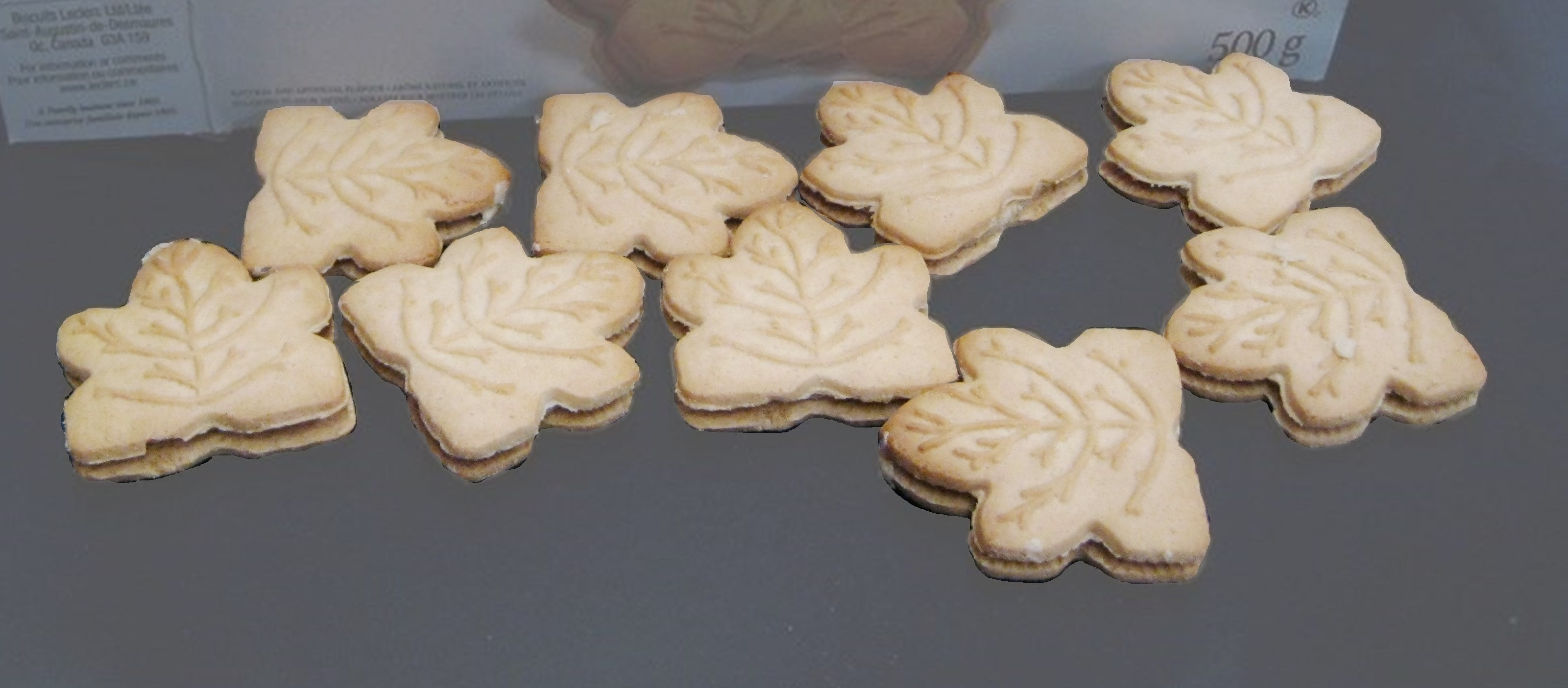 Biscuits Leclerc : Feuilles d'érables